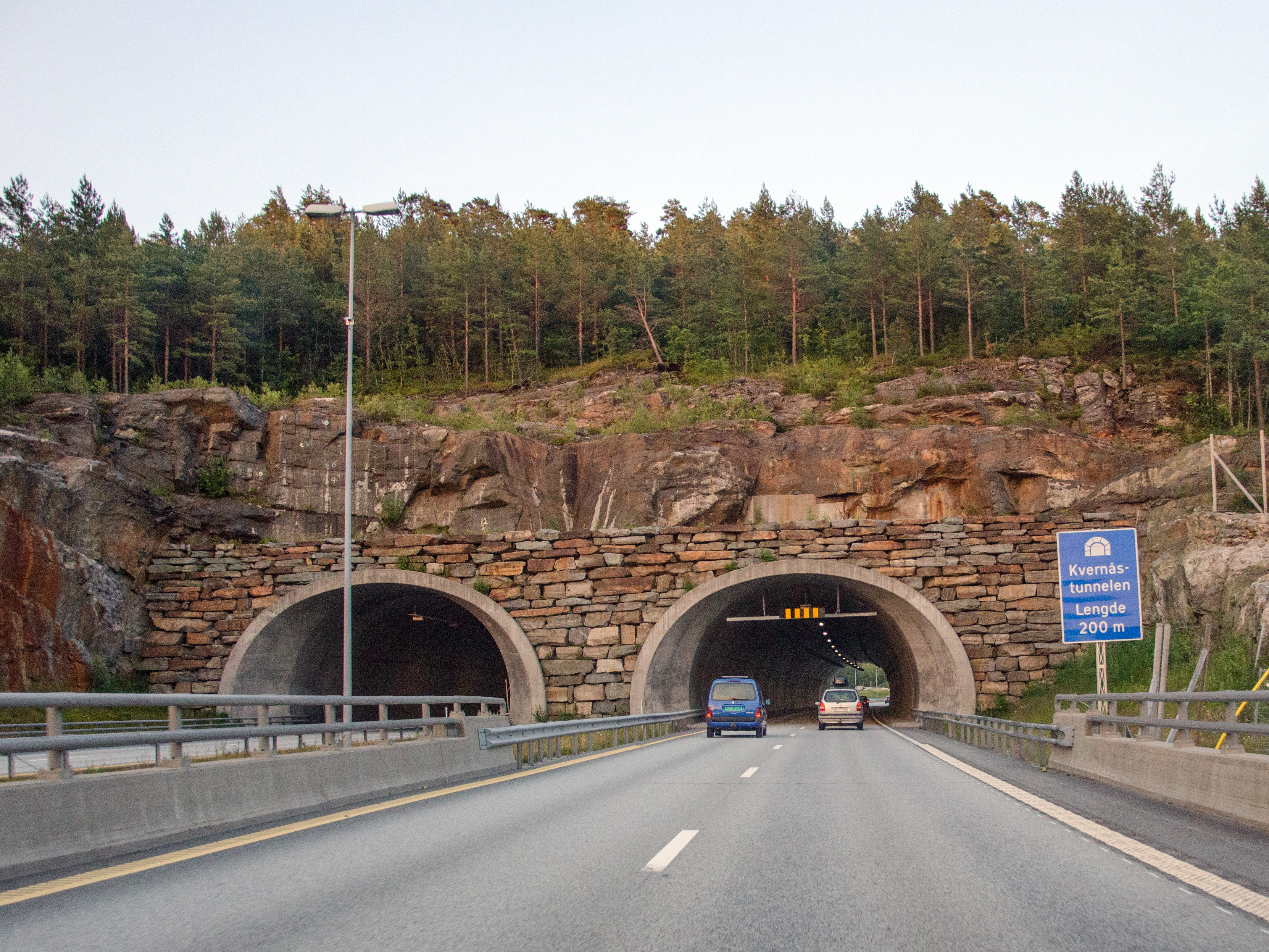 Kvernåstunnelen på E18